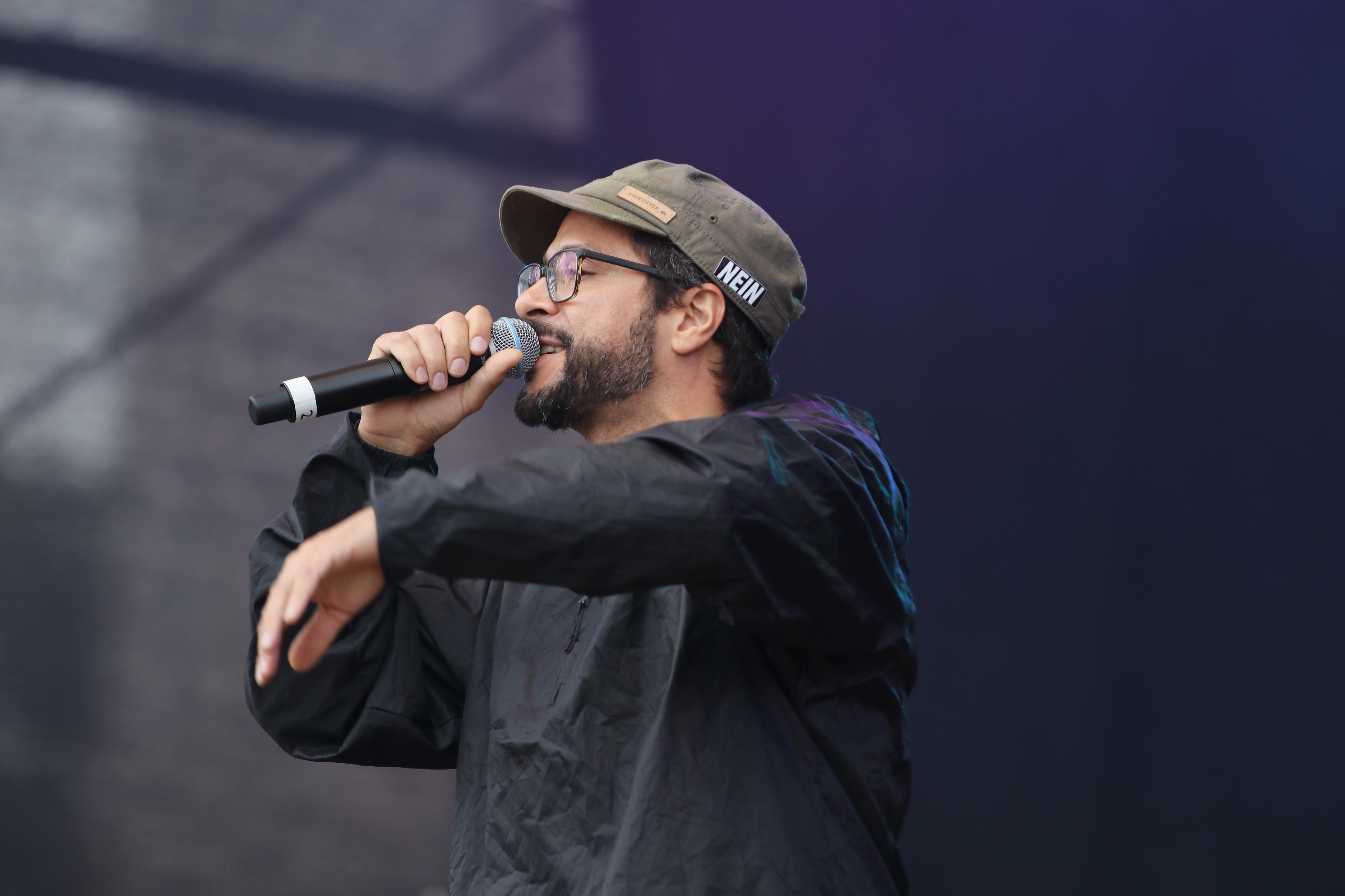 Ausgehetzt, Demonstration in München am 22. Juli 2018 gegen den Rechtsruck in der bayerischen Politik